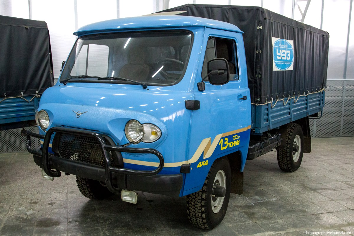 УАЗ-3303. Выставочный павильон-музей УАЗа.